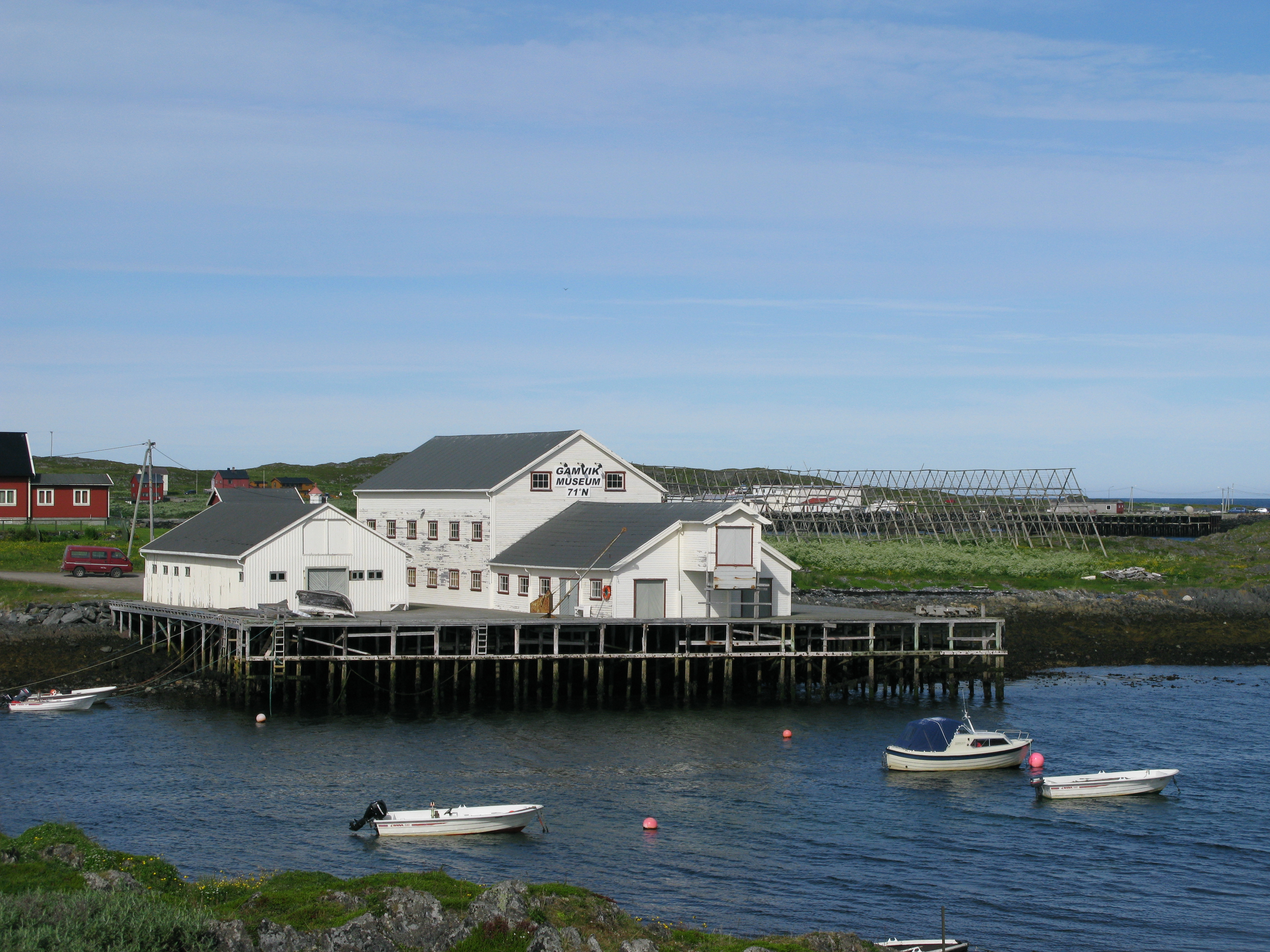 Verdens nordligste museum på fast land; Pyramidehjell